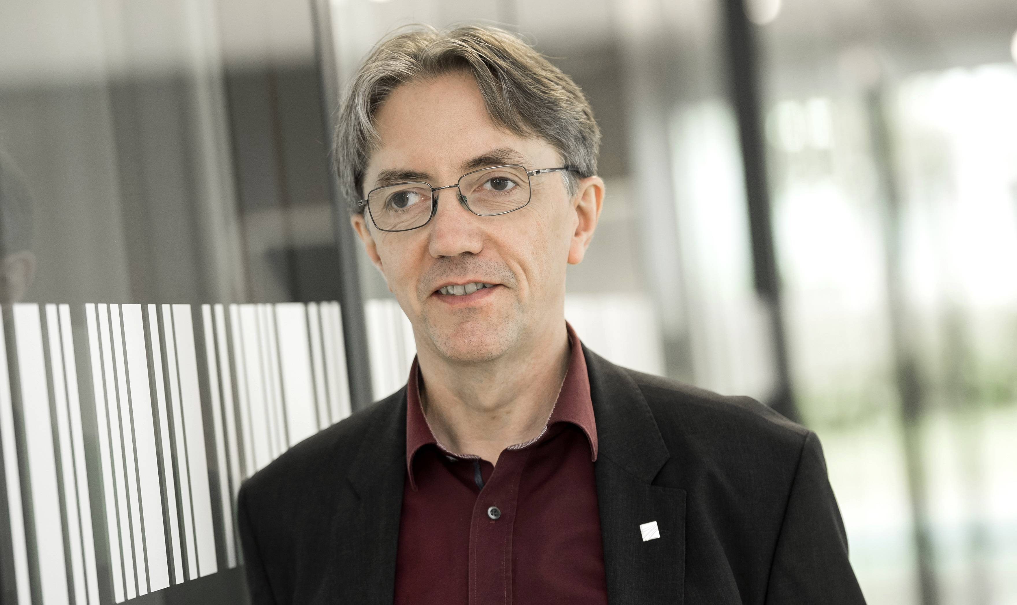 Prof. Dr. Michael Waidner (2017)